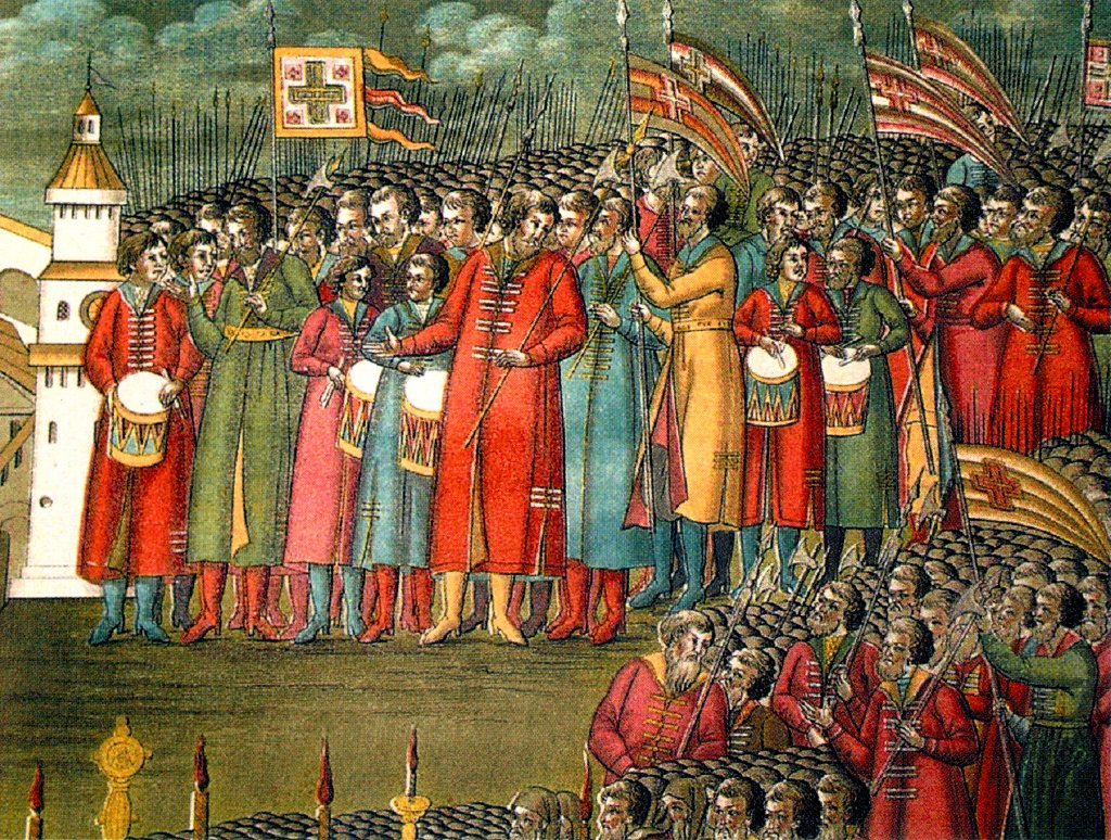 Стрельцы на избрании Михаила Фёдоровича